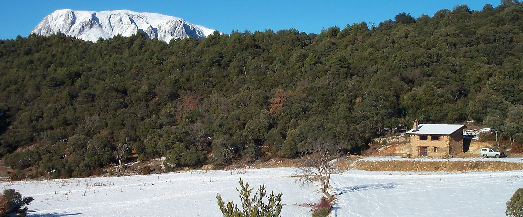 Borda de Rin de la Carrasca, a la Serra del Jordal. Municipi d'Isàvena -Ribagorça aragonesa-. Es pot pujar a Rin pel camí del Pedregal, entre les Llempies i Guardiguala (ara El Rin)